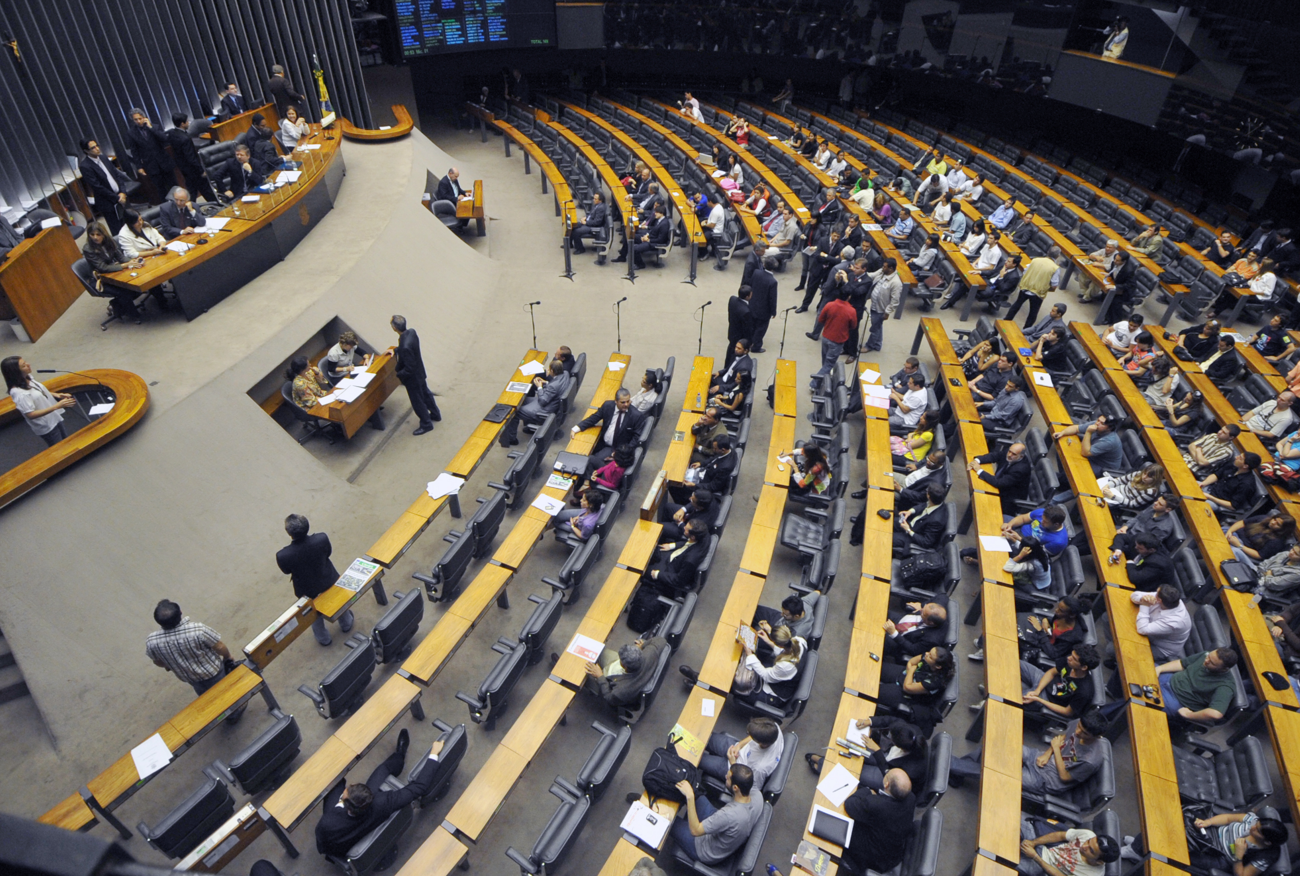 A presidente da União Nacional dos Estudantes (UNE), Lúcia Stumpf, fala durante sessão solene na Câmara dos Deputados em homenagem aos 30 anos de reconstrução da entidade.